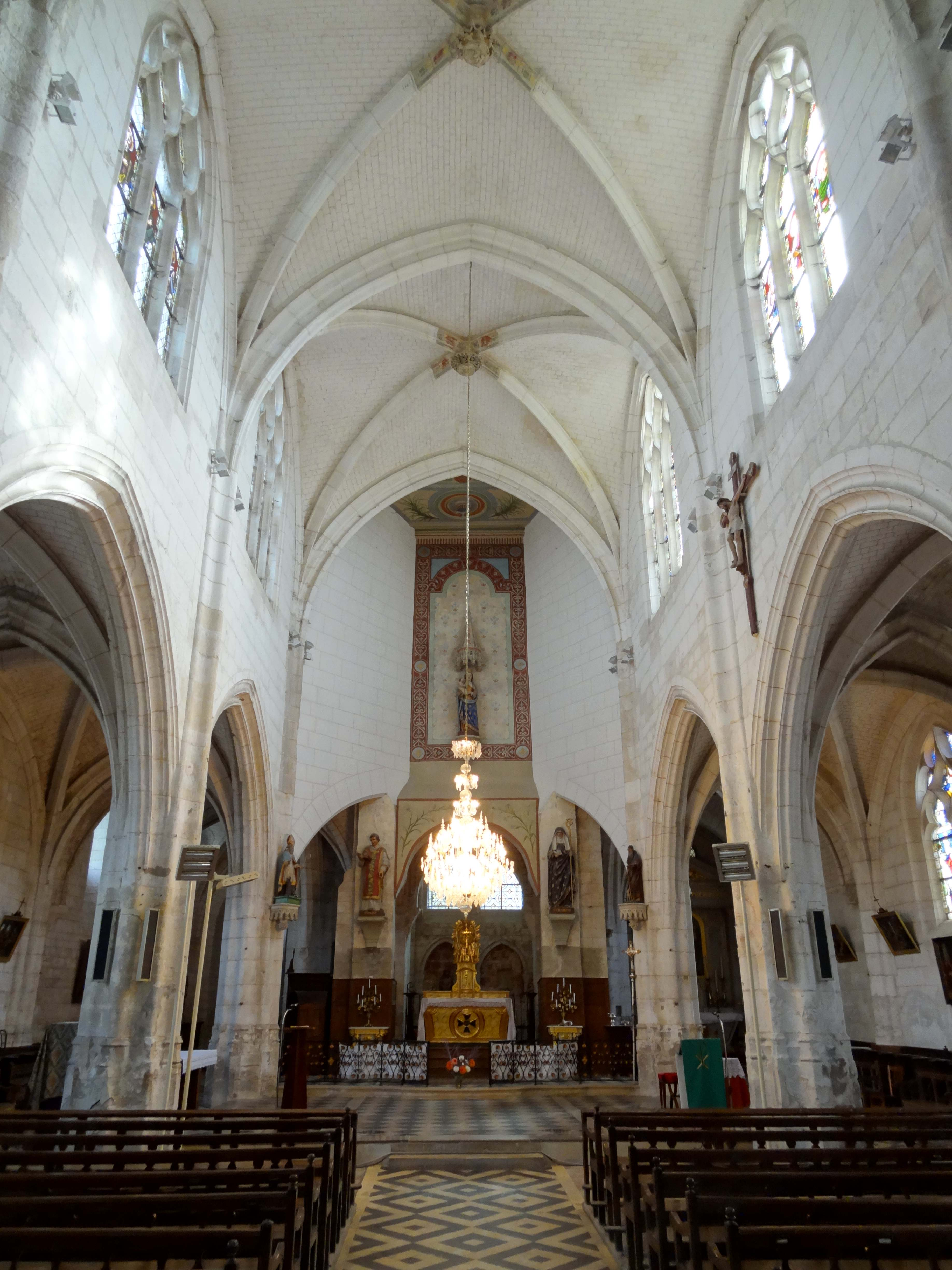 Intérieur de l'église - voir titre.